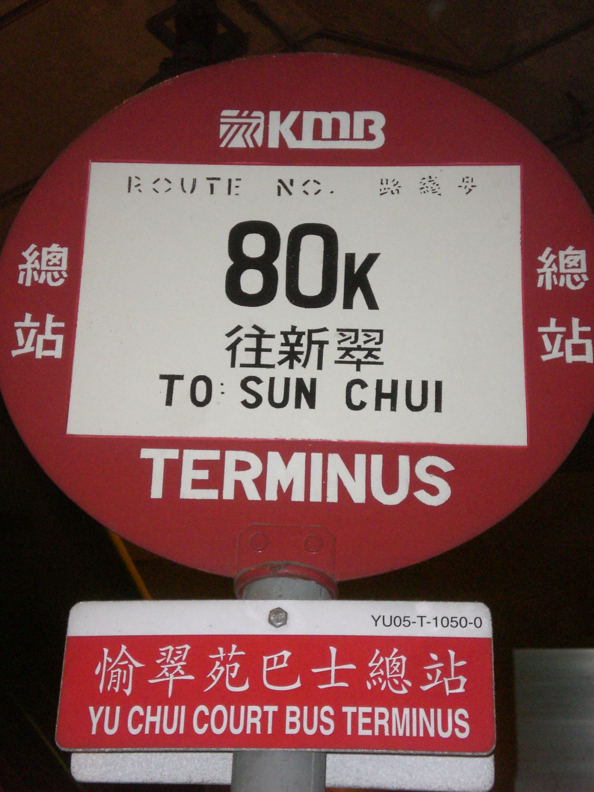 九龍巴士80K線巴士站